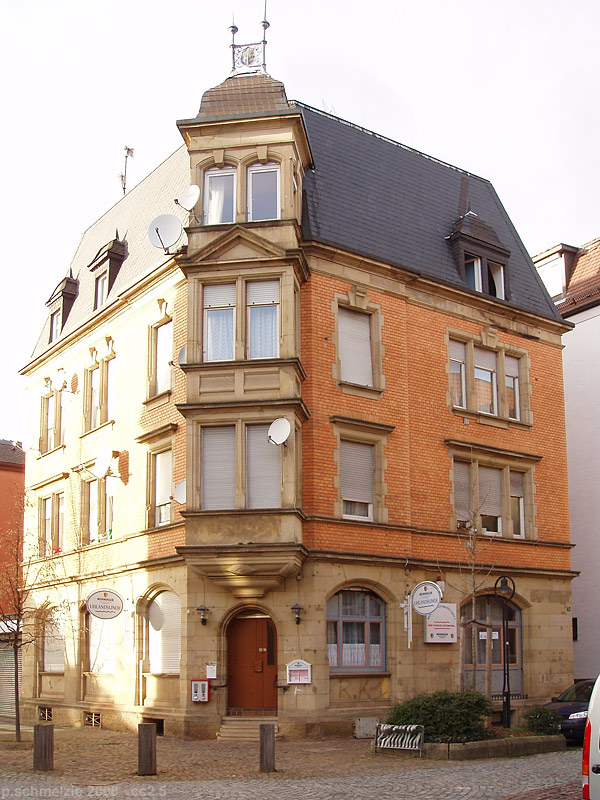 Denkmalgeschütztes Wohnhaus in der Uhlandstr. 70 in Heilbronn, Rückansicht